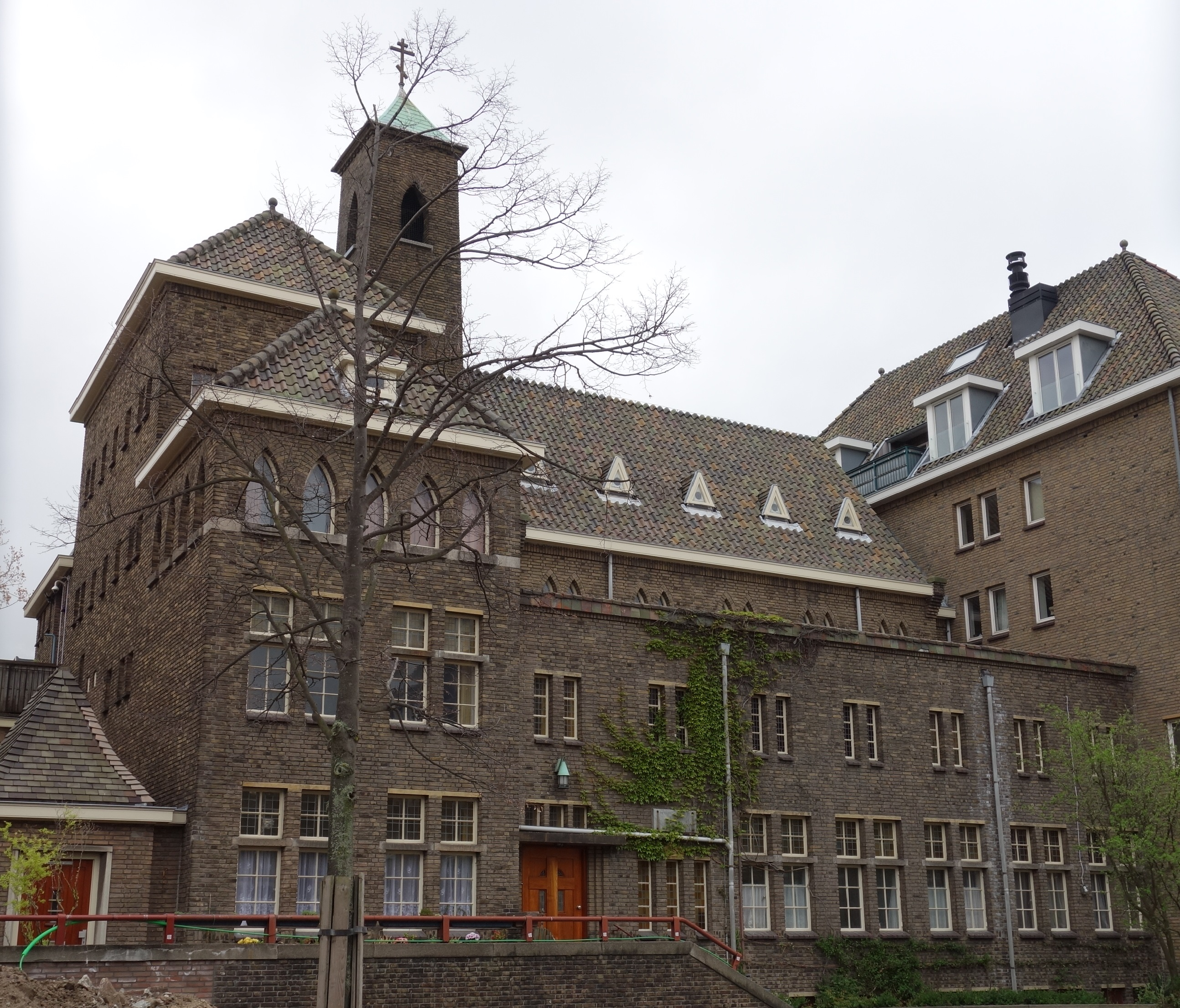 Russisch Orthodox klooster aan de Dr. Kuyperstraat in Den Haag.